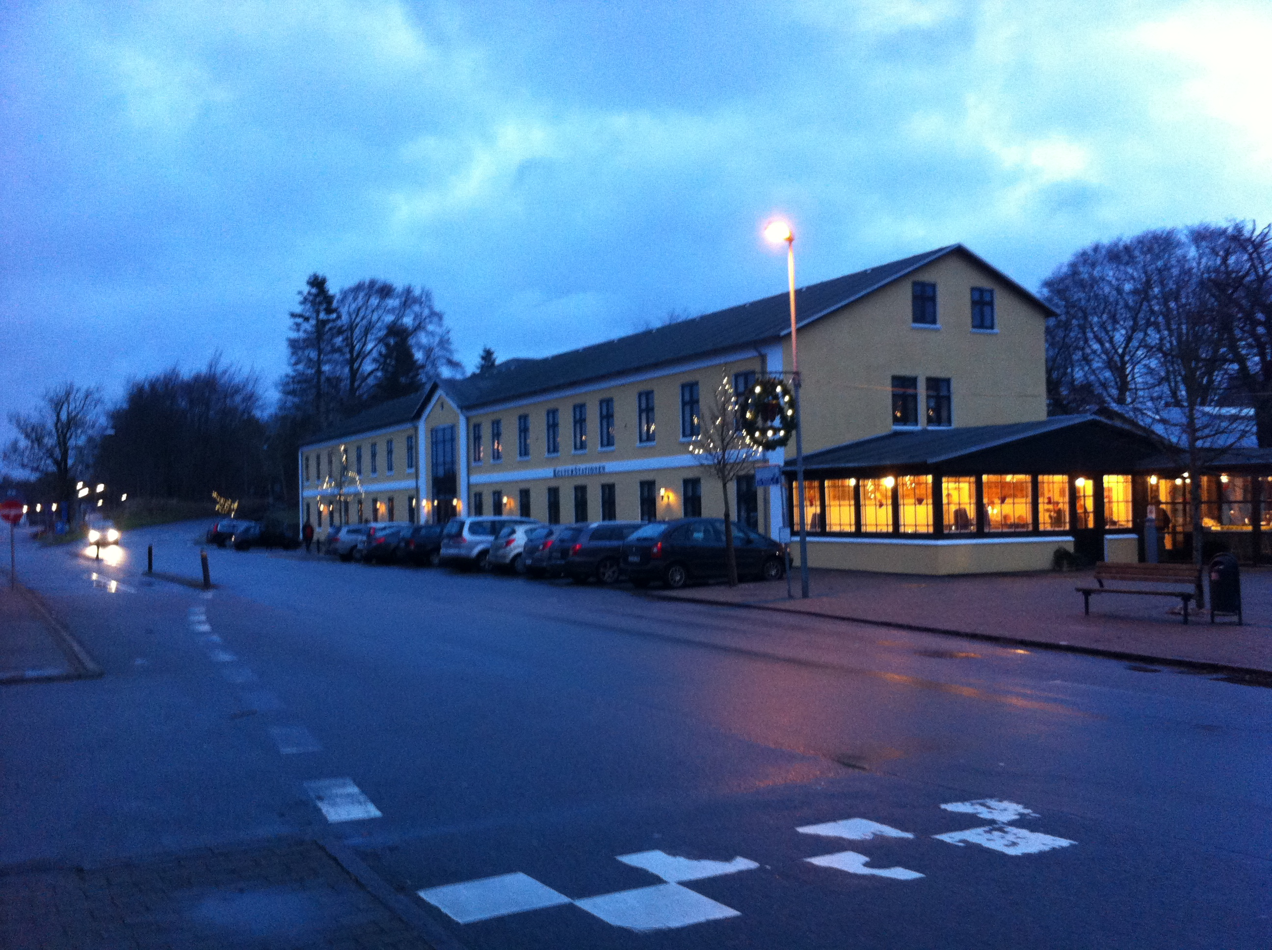 Skørping KulturStation på Sverriggårdsvej i Skørping.